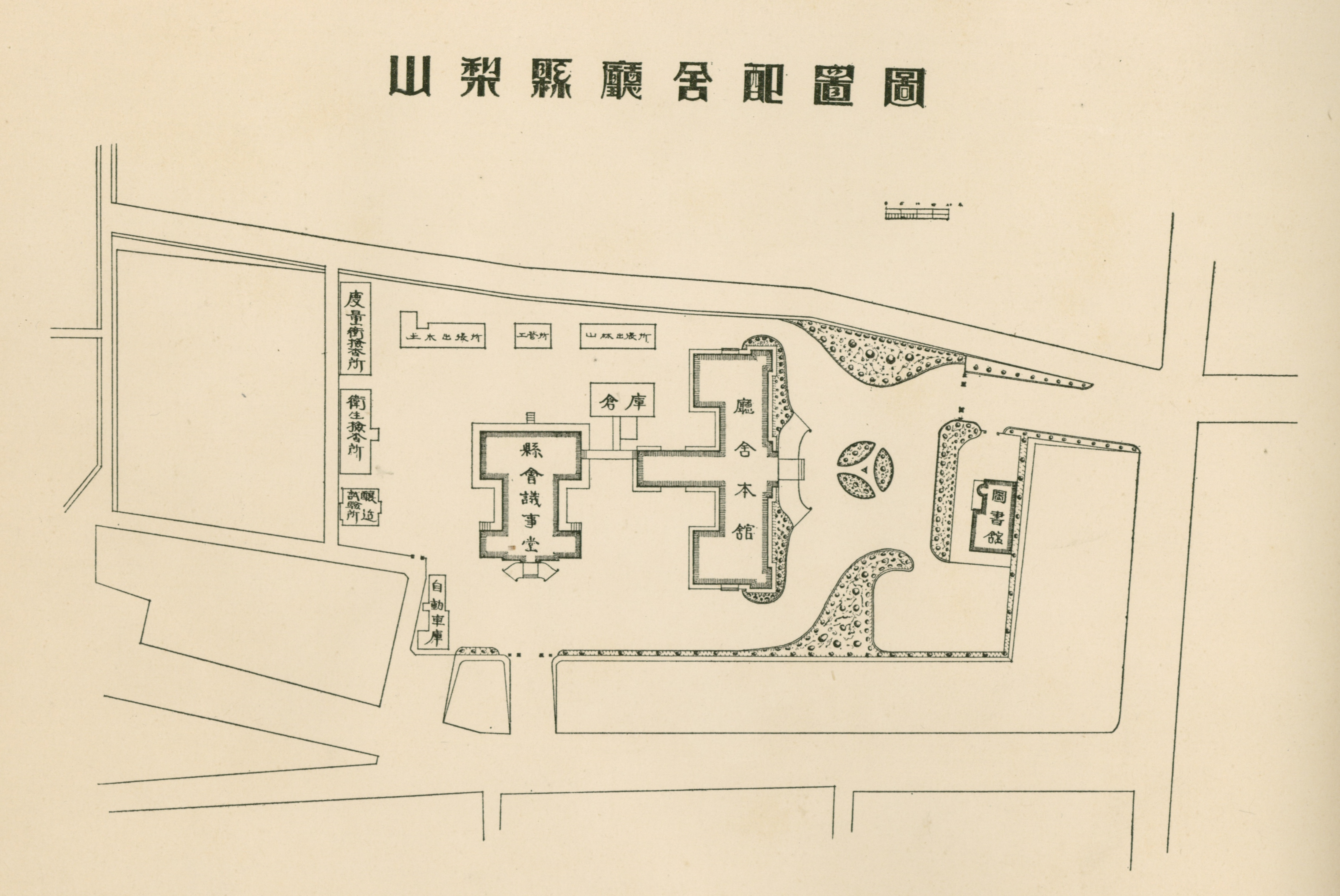 山梨県庁舎配置図